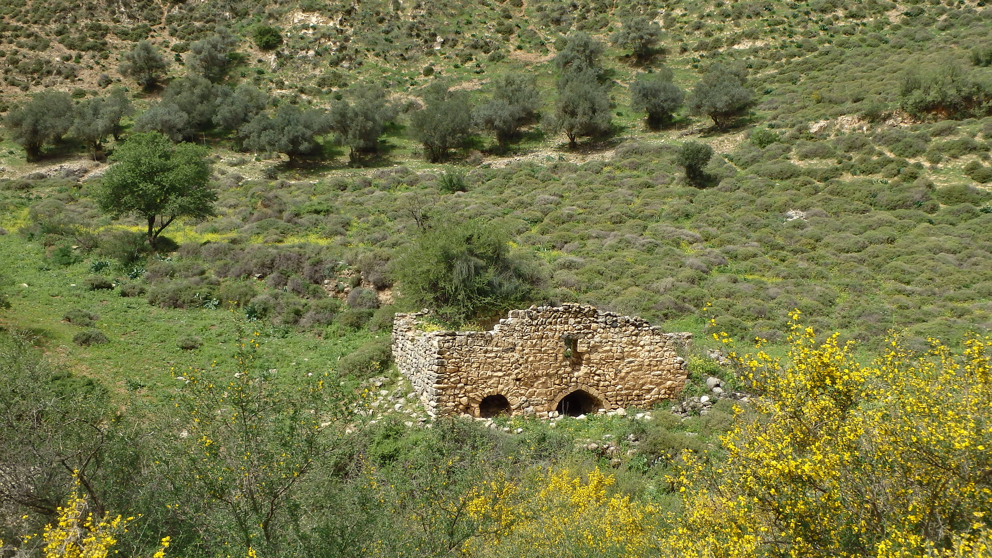 Nahal Dishon